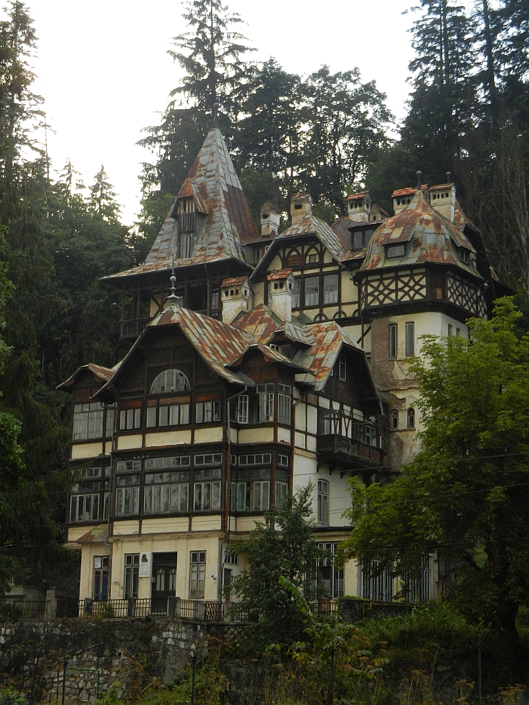 Vila "Carola"